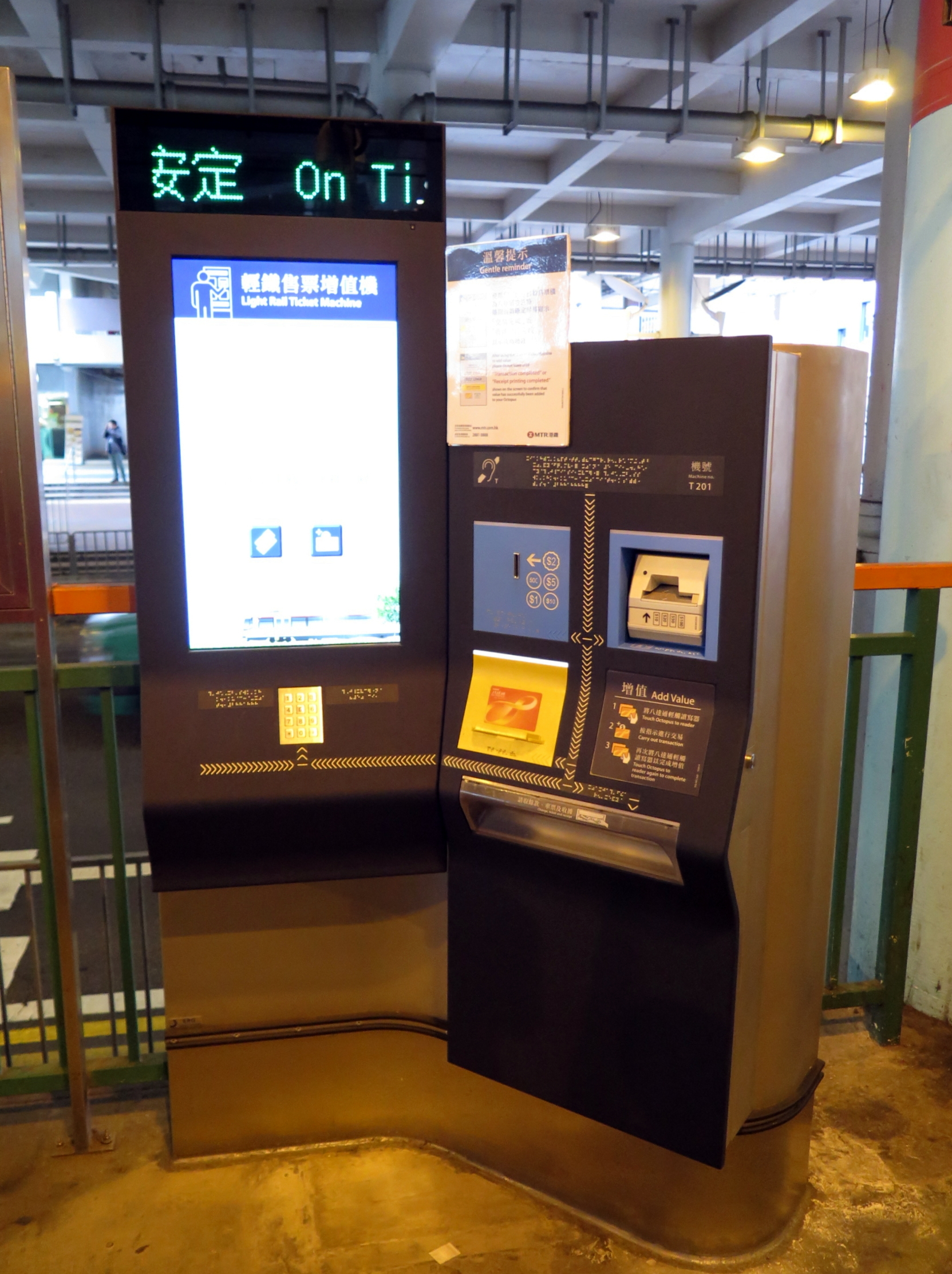 LRT New Ticket Machine